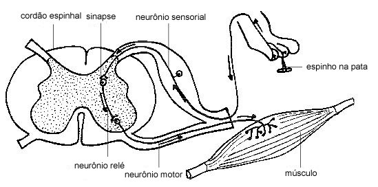 Anatomia e fisiologia do Arco Reflexo - dor animal